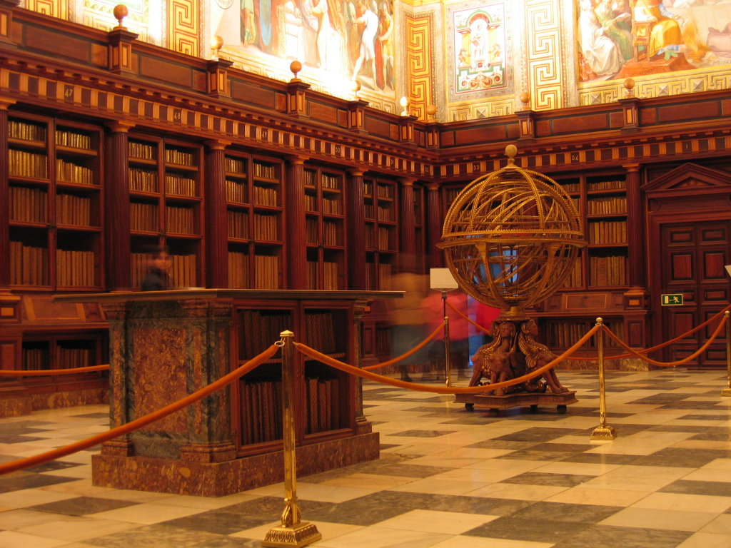 Biblioteca del Monasterio de San Lorenzo de El Escorial, en la Comunidad de Madrid